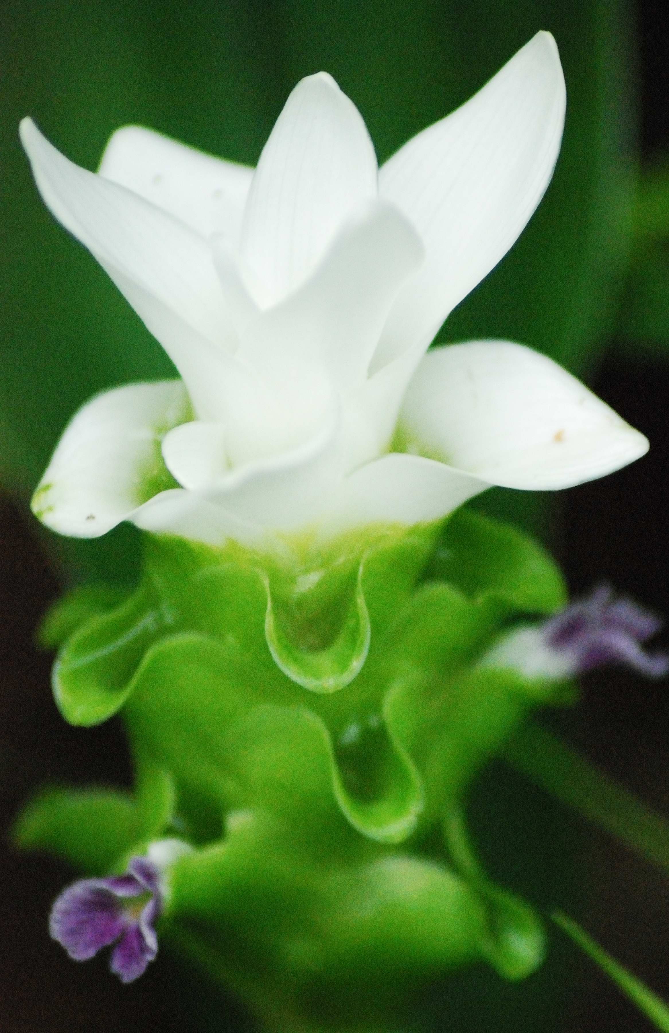 ดอกกระเจียวขาว (Curcuma parviflora) ผาก่อรัก อุทยานแห่งชาติป่าหินงาม